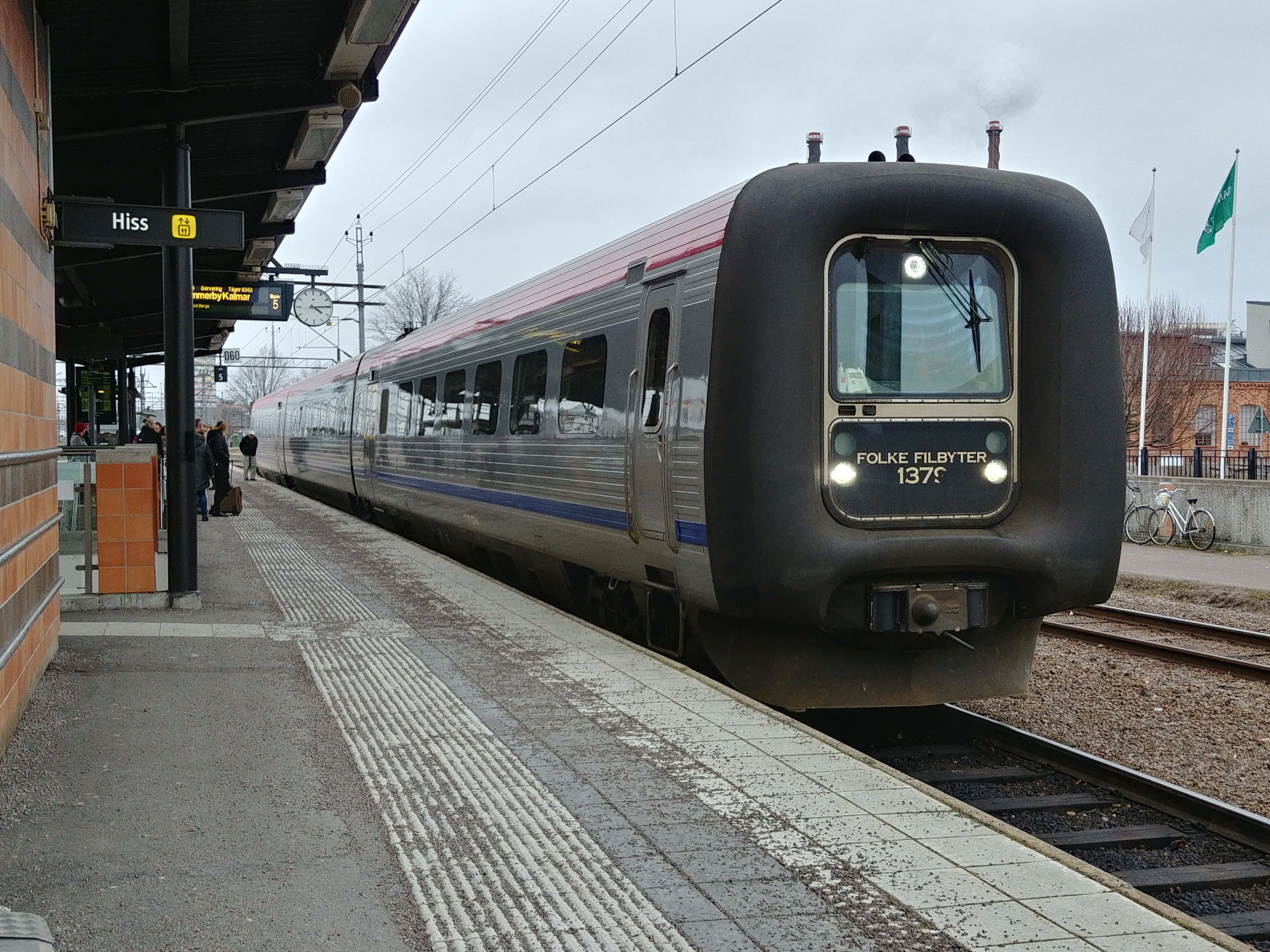 A dieseltrain in Linköping. Model: Bombardier(former ABB Scandia) Y2, also called IC3-MF. Unit: 1379, owned by Kalmar Länstrafik.